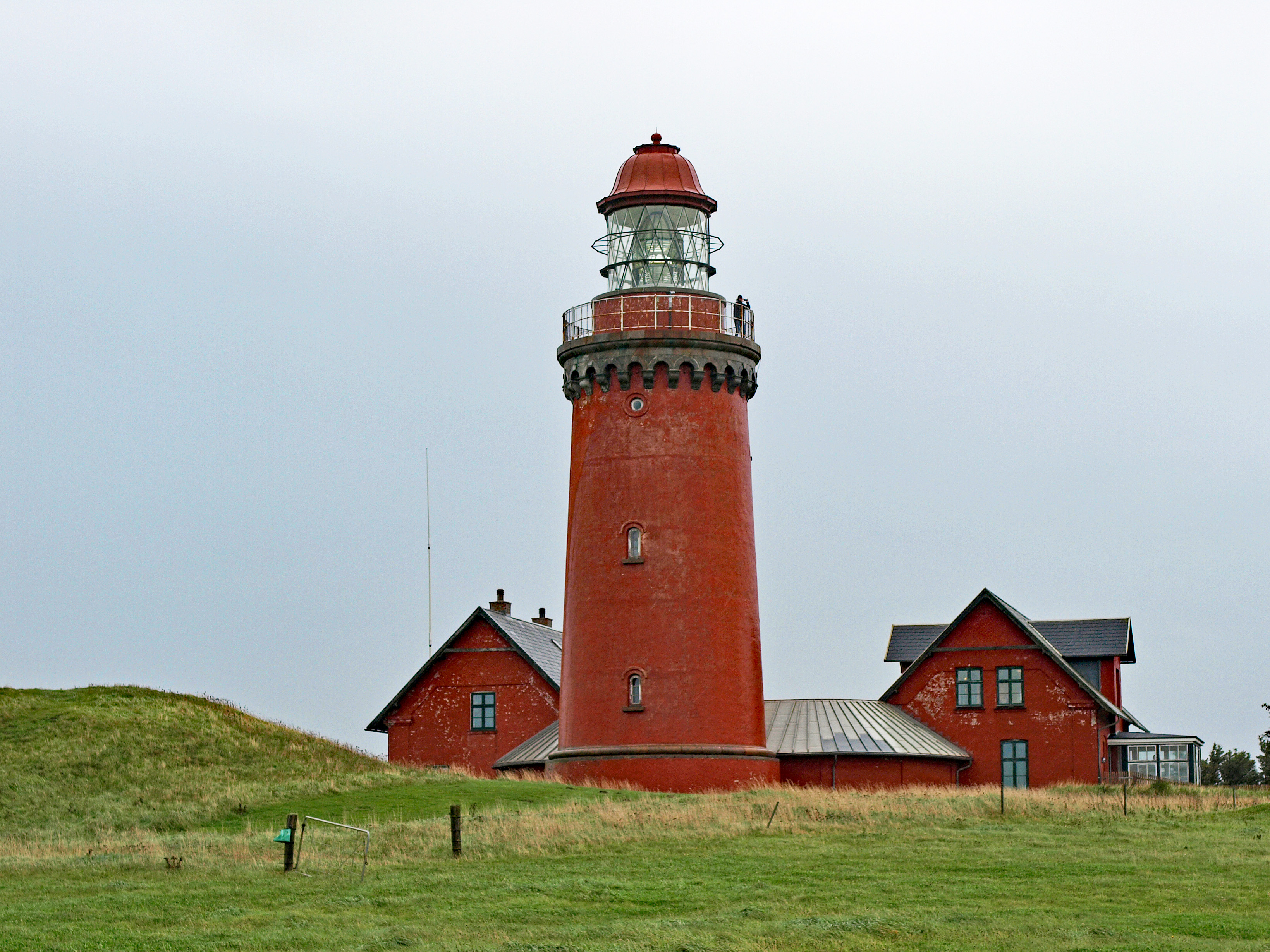 Leuchtturm Bovbjerg